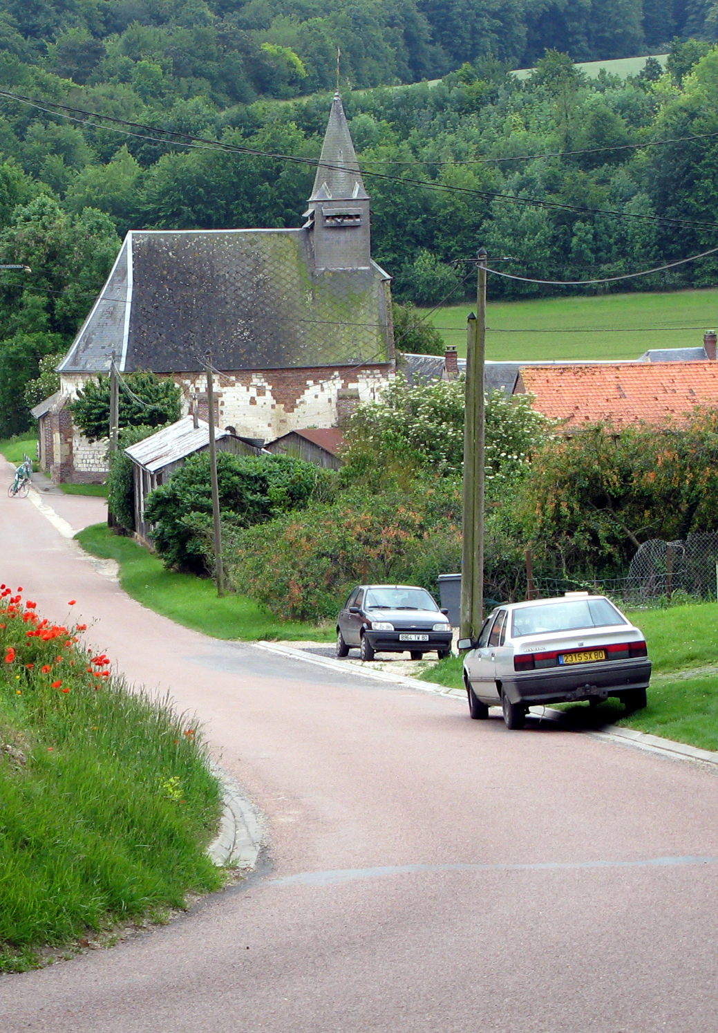 Ainval, hameau de Grivesnes (Somme, France) - L'église et les quelques maisons l'entourant, vues depuis le virage de la route venant de la départementale reliant Ailly-sur-Noye à Montdidier.